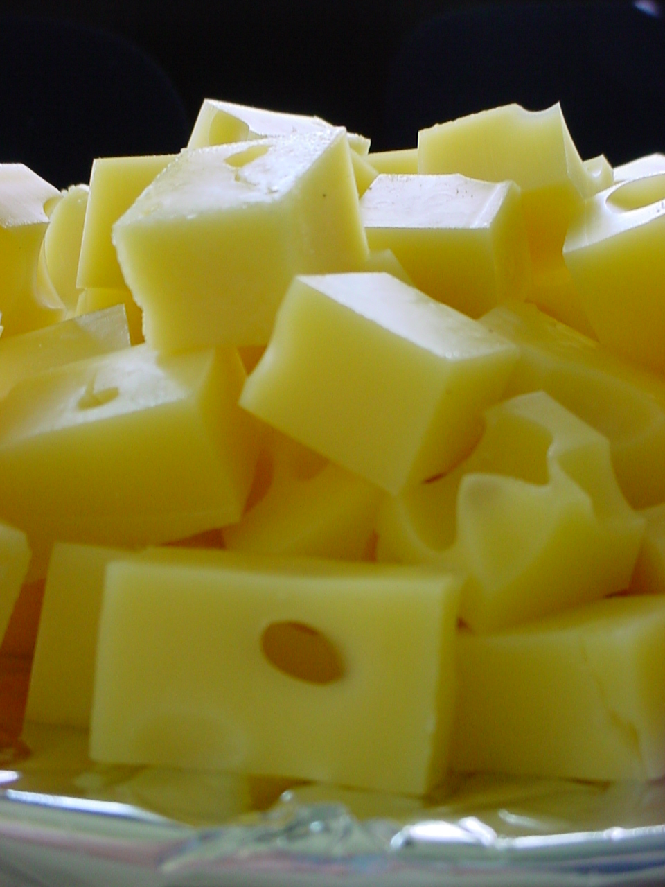 Kaas Auteur: Christian Bauer Bron